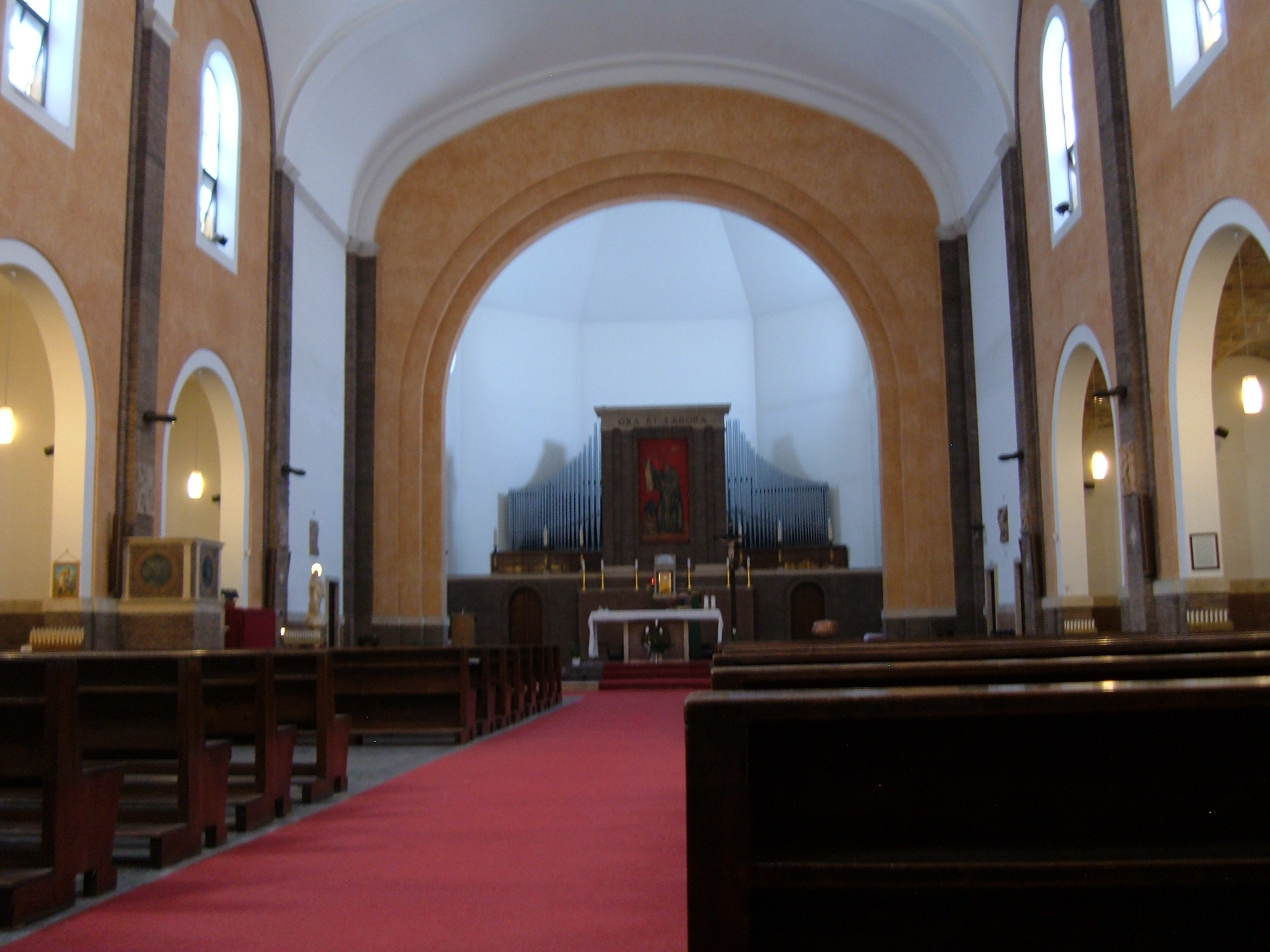 Chiesa di San Benedetto, a Roma, nel quartiere Ostiense, in via del Gazometro.